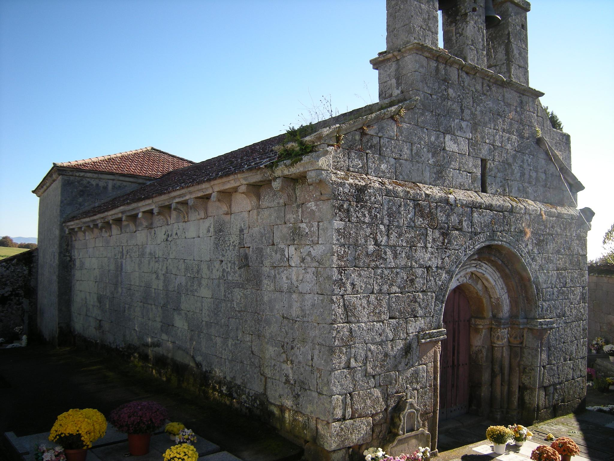 Igreja de Santa Maria de Couso da Limia